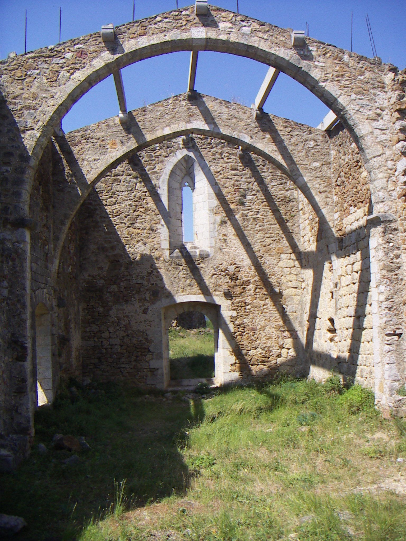 Santa Maria del Roure (Pont de Molins)